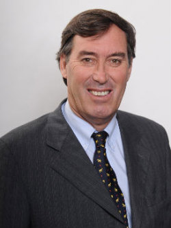 Alejandro García-Huidobro Sanfuentes, diputado y senador chileno.